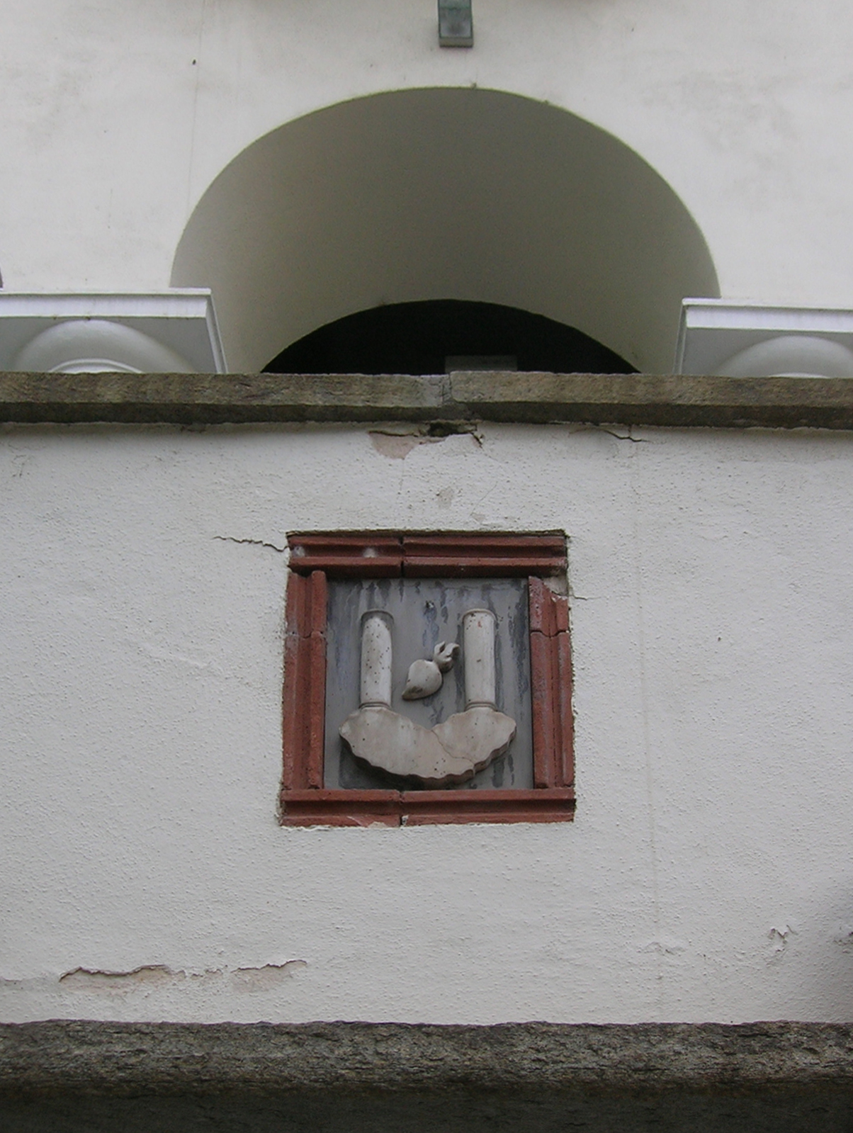 L'insegna dell'Ordine del Gran San Bernardo inserita negli anni cinquanta. Castello di Montfleury, Aosta, Valle d'Aosta, Italia.